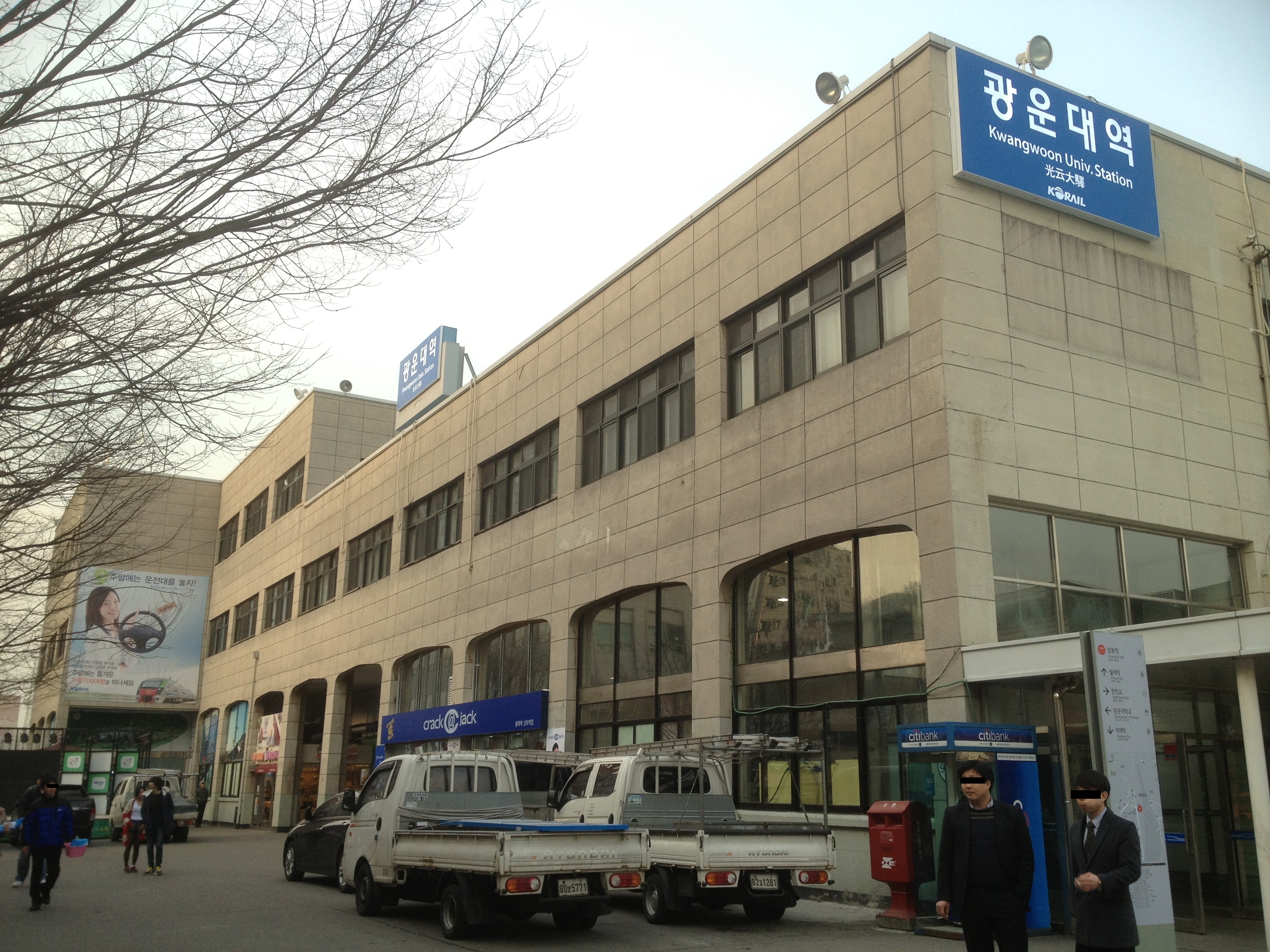 경원선 광운대역